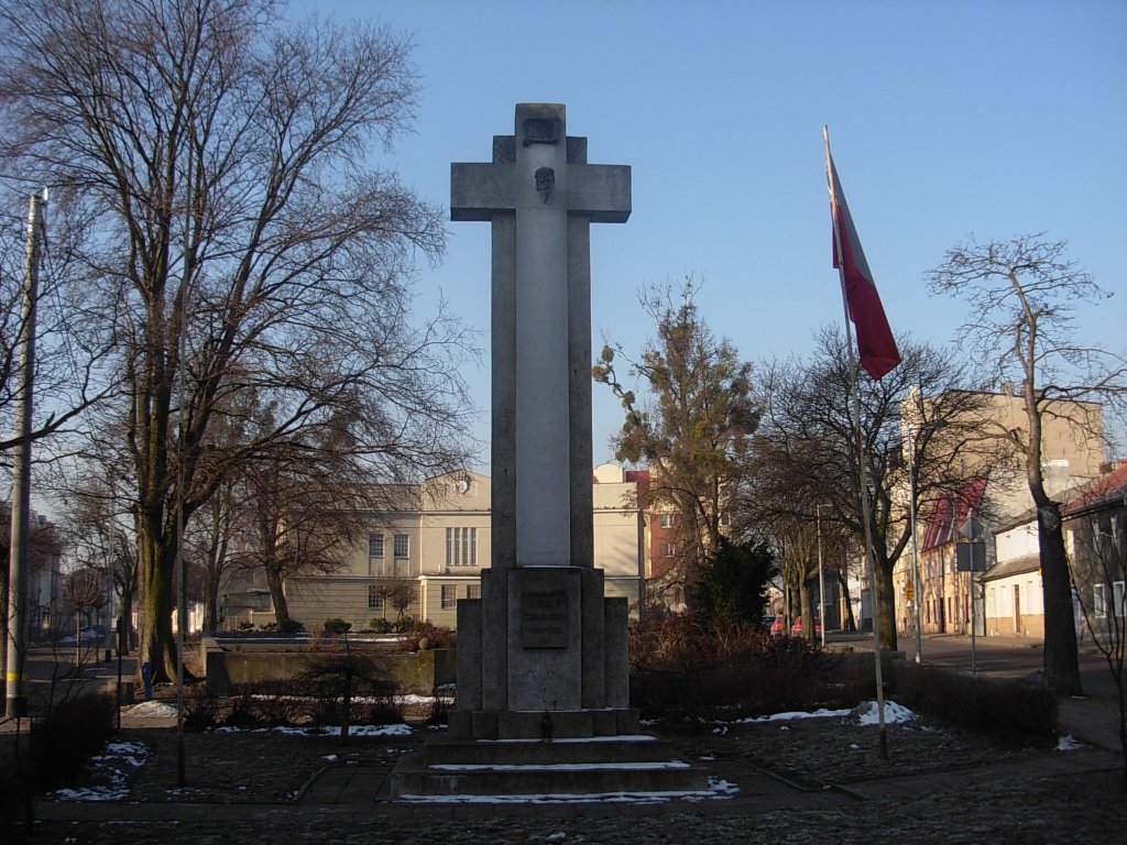 Krzyż - pomnik na Szwederowie w Bydgoszczy